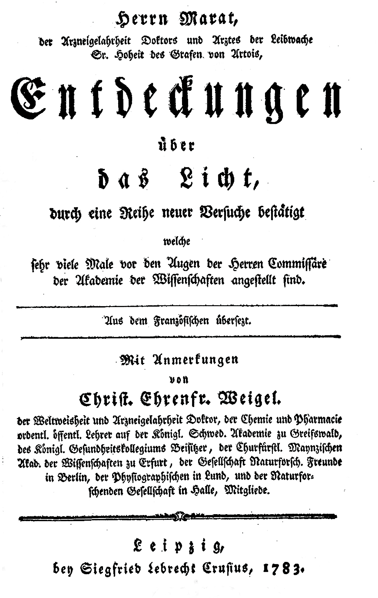 Christian Ehrenfried Weigel: Übersetzung von Marats "Entdeckungen über das Licht", 1783